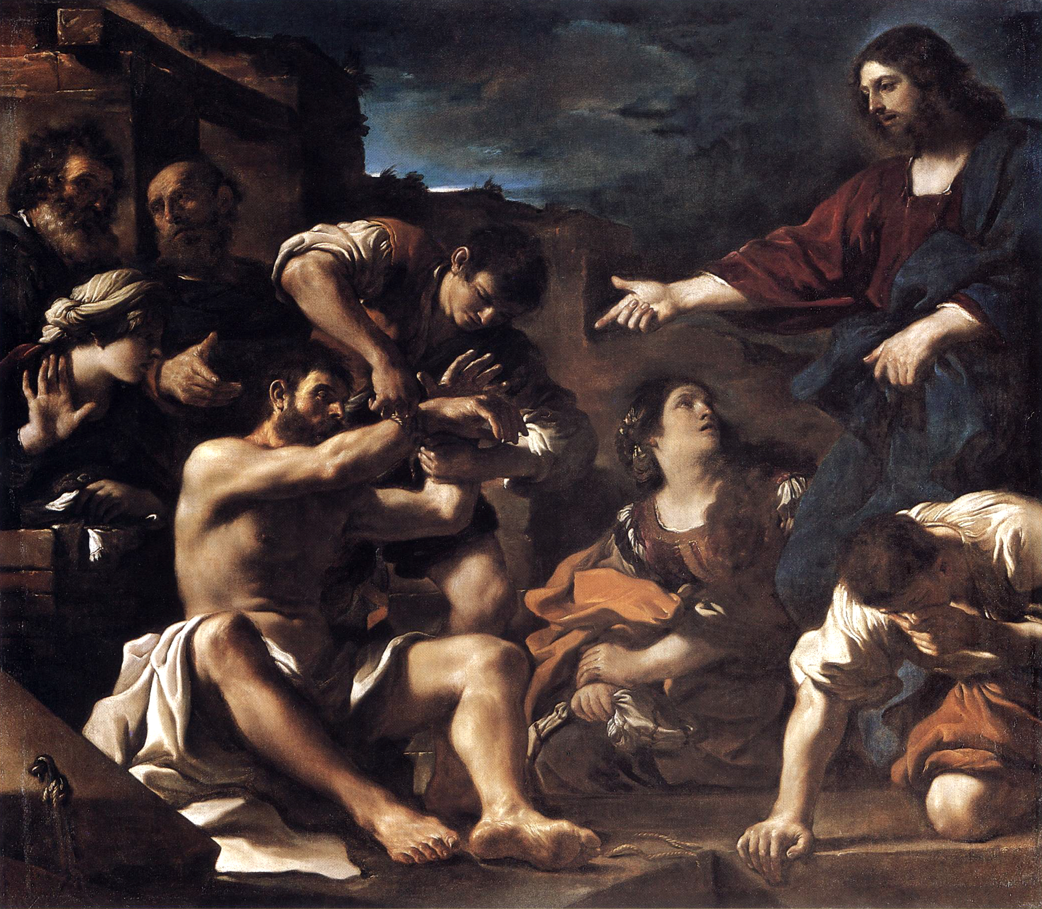 Resurrezione di Lazzaro, o/tl, 200 x 230, Paris Louvre